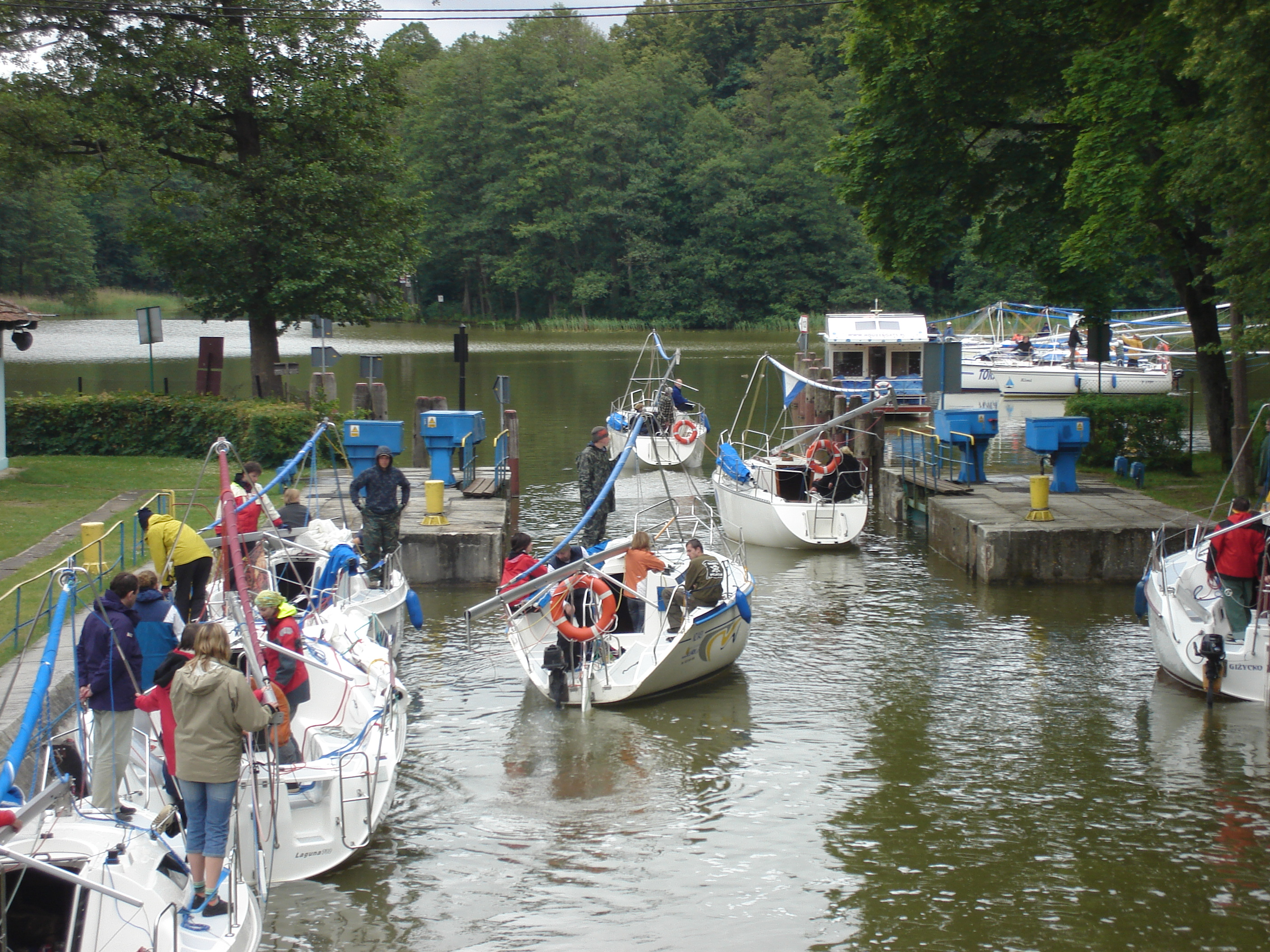 Śluza Guzianka. Jachty wypływają.